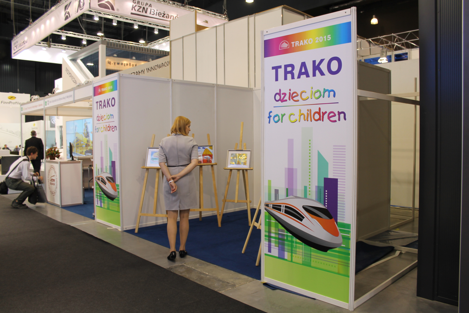 Stoisko Trako dzieciom podczas targów Trako 2015. The making of this document was supported by Wikimedia Polska Association, within Wikigrant no. WG 2015-34. English | polski | +/−